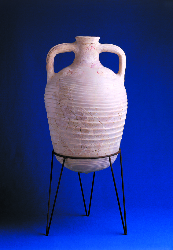 'Amfora bizantina amb l'escriptura en grec XMG (Xriston Maria Genna)